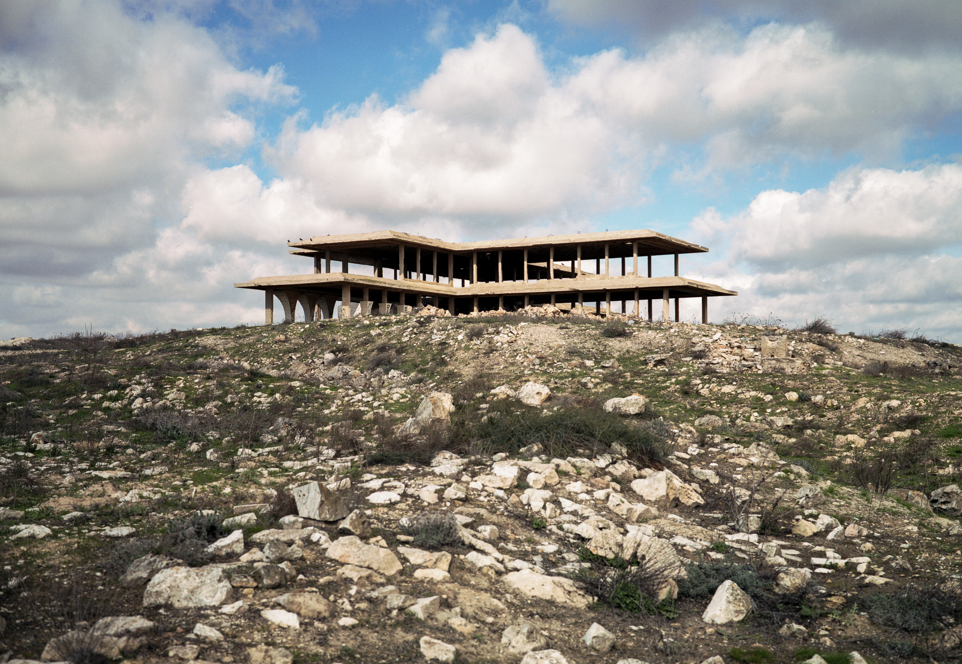 תֵּל אֶל פוּל הוא שמו של תל בצפון ירושלים, בין השכונות פסגת זאב, שועפאט ובית חנינא. התל הוא גן ארכאולוגי פתוח. האתר מזוהה כעיר המקראית גבעה שהייתה העיר הראשית של שבט בנימין וידועה במקרא גם בשמות "גבעת בנימין", "גבעת שאול" ו"גבעת האלוהים".